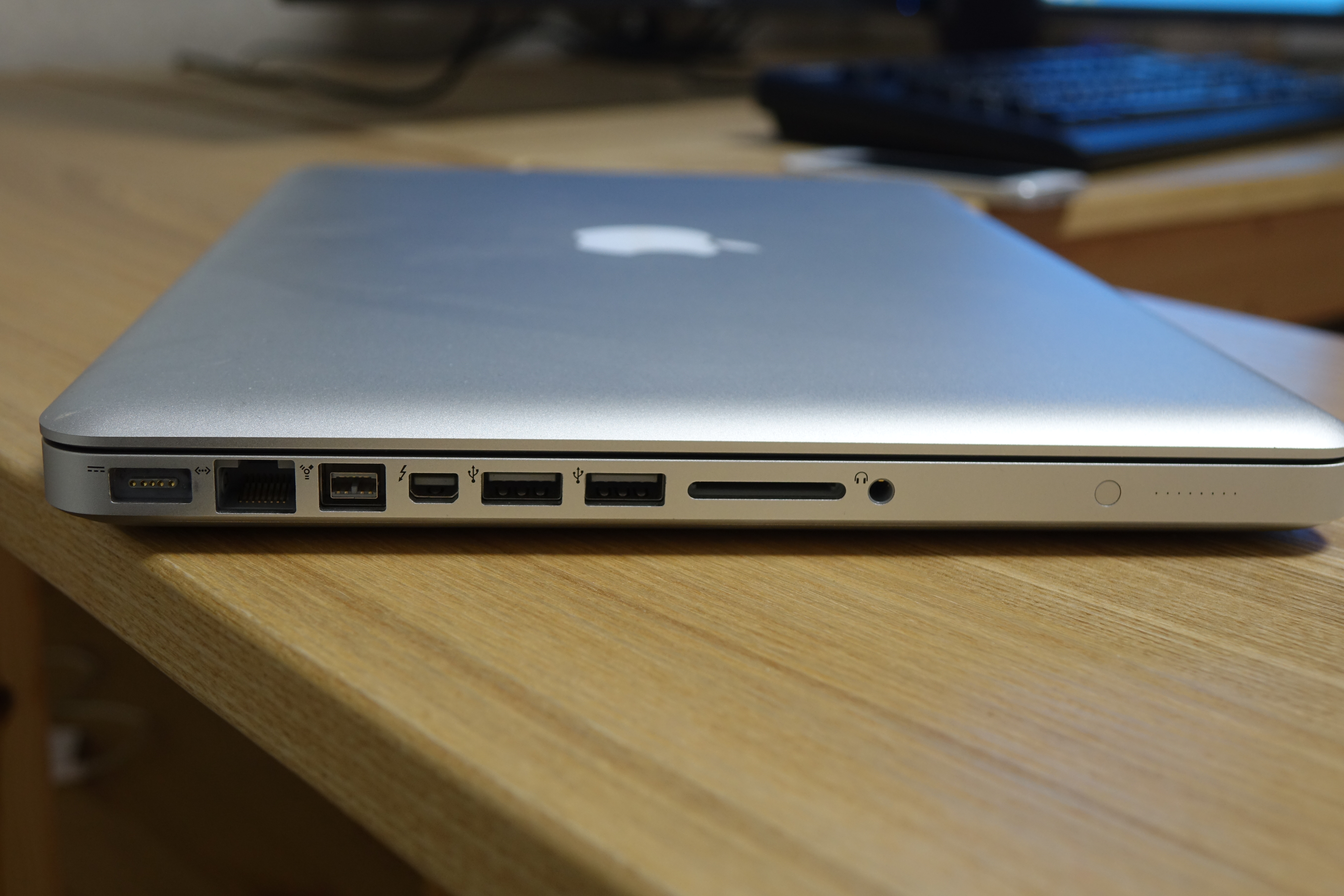 맥북